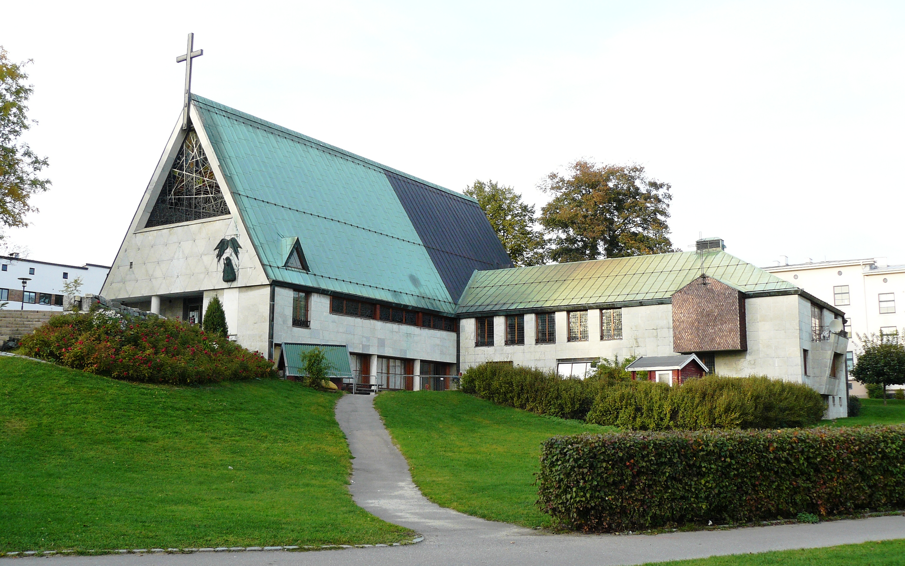 Torshov kirke, Oslo